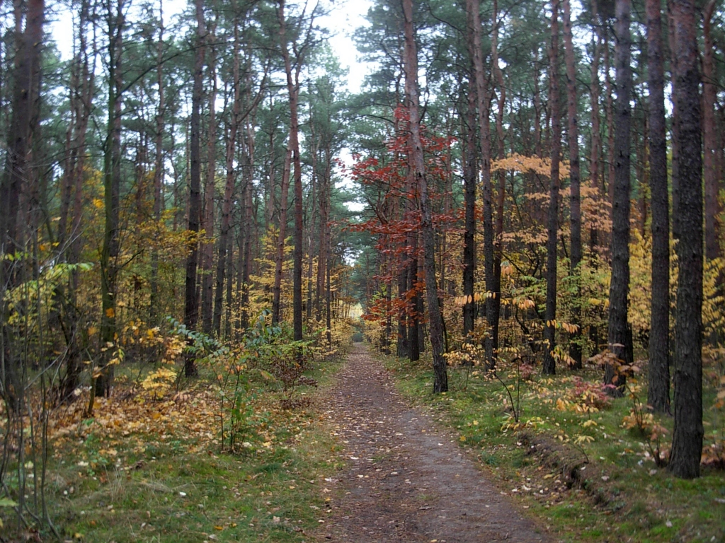 Las w parku myślęcińskim